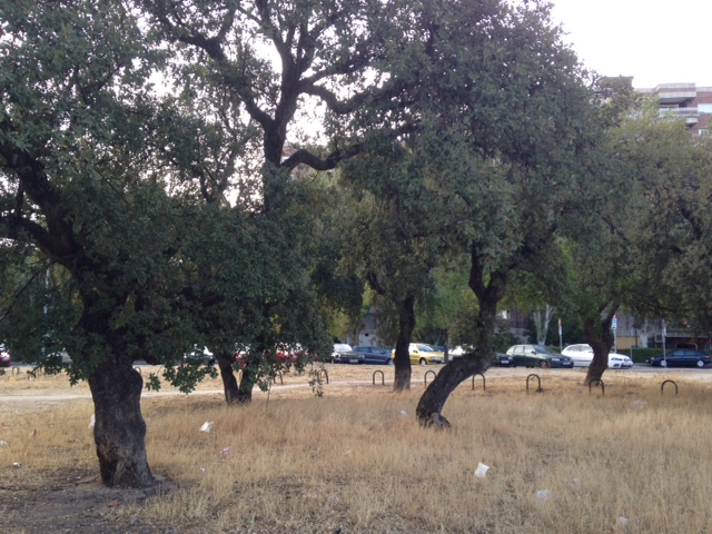 Otra vista oesta del alcornocal de Viña Grande